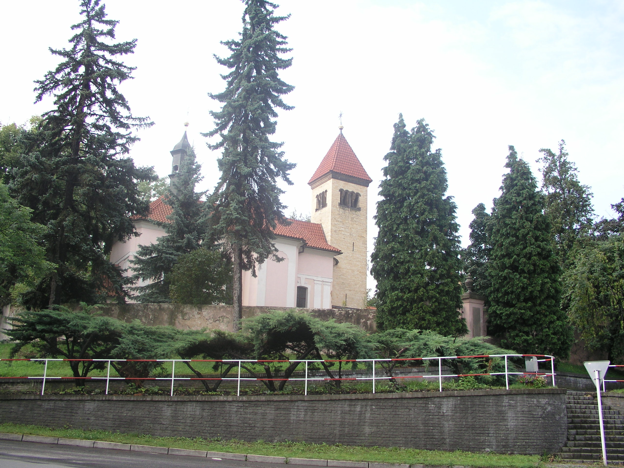 kostel na Řeporyjském náměstí